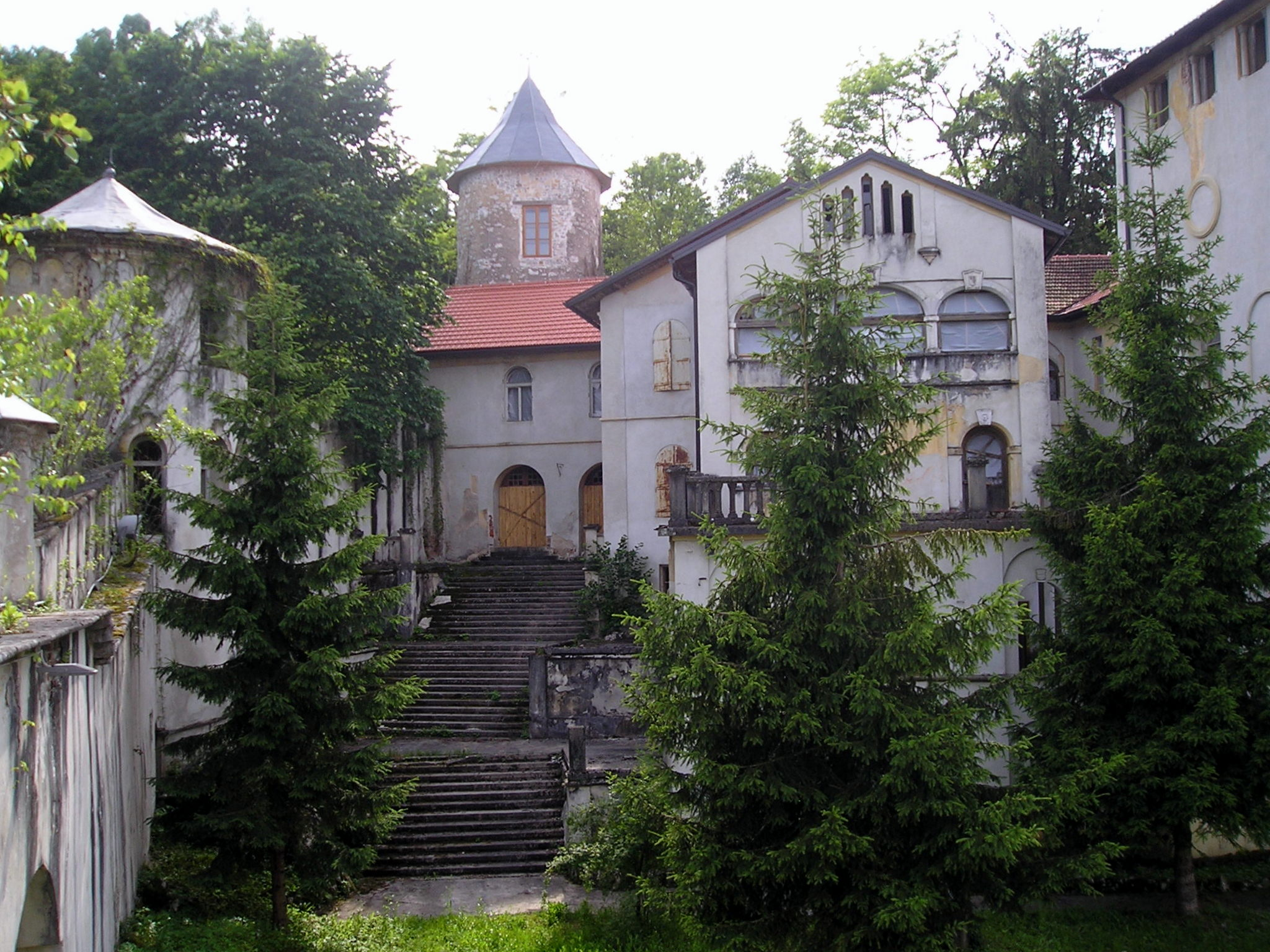 Dvorac, Bosiljevo